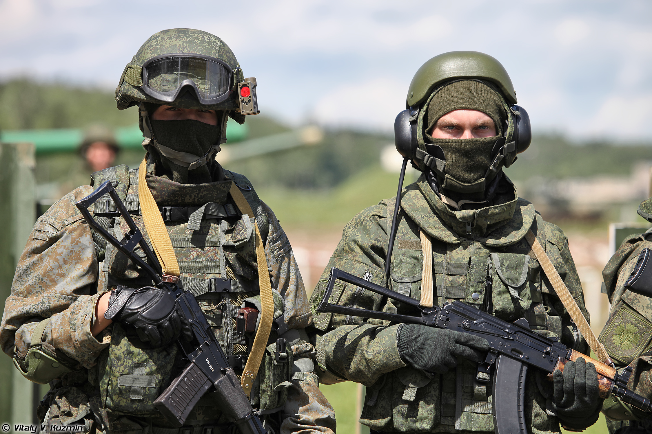 Комплект боевой экипировки Ратник для разведчика и защитный комплект для экипажей бронированных машин 6Б48 Ратник-ЗК (Ratnik infantry combat system in recon variant and AFV crew individual protection kit 6B48 Ratnik-ZK)